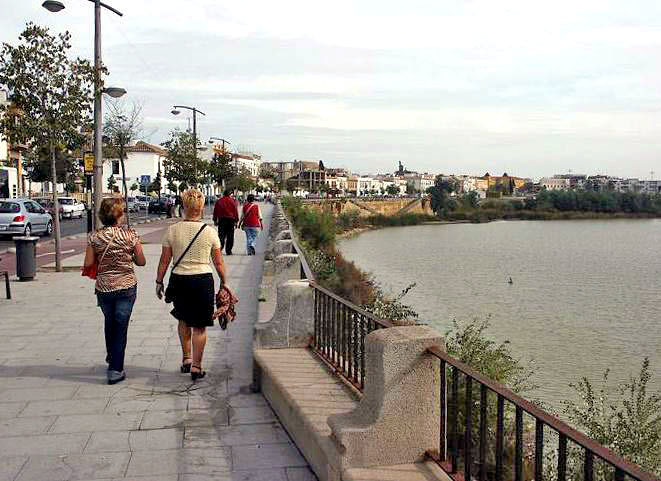 Paseo de la Ribera de Córdoba (España).